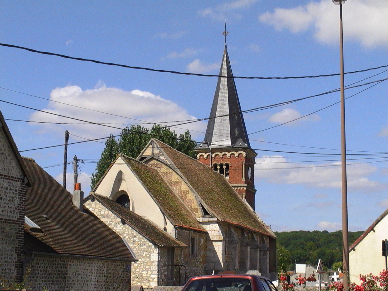 Église Saint-Pierre à Incarville - 14 août 2017.